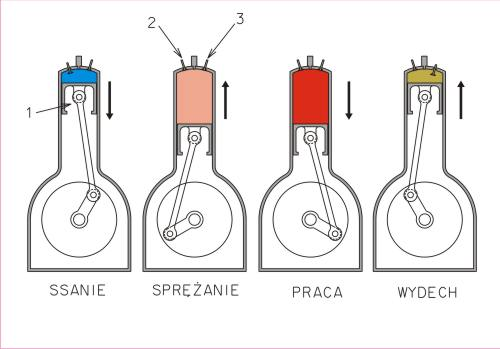 Silnik czterosuwowy-idea